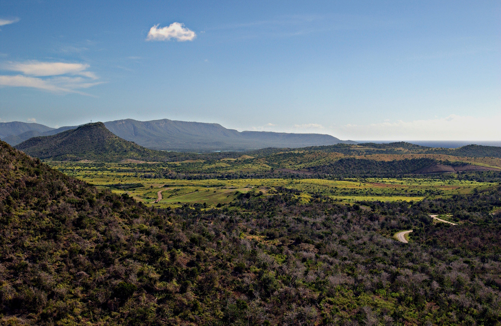 GTMO View